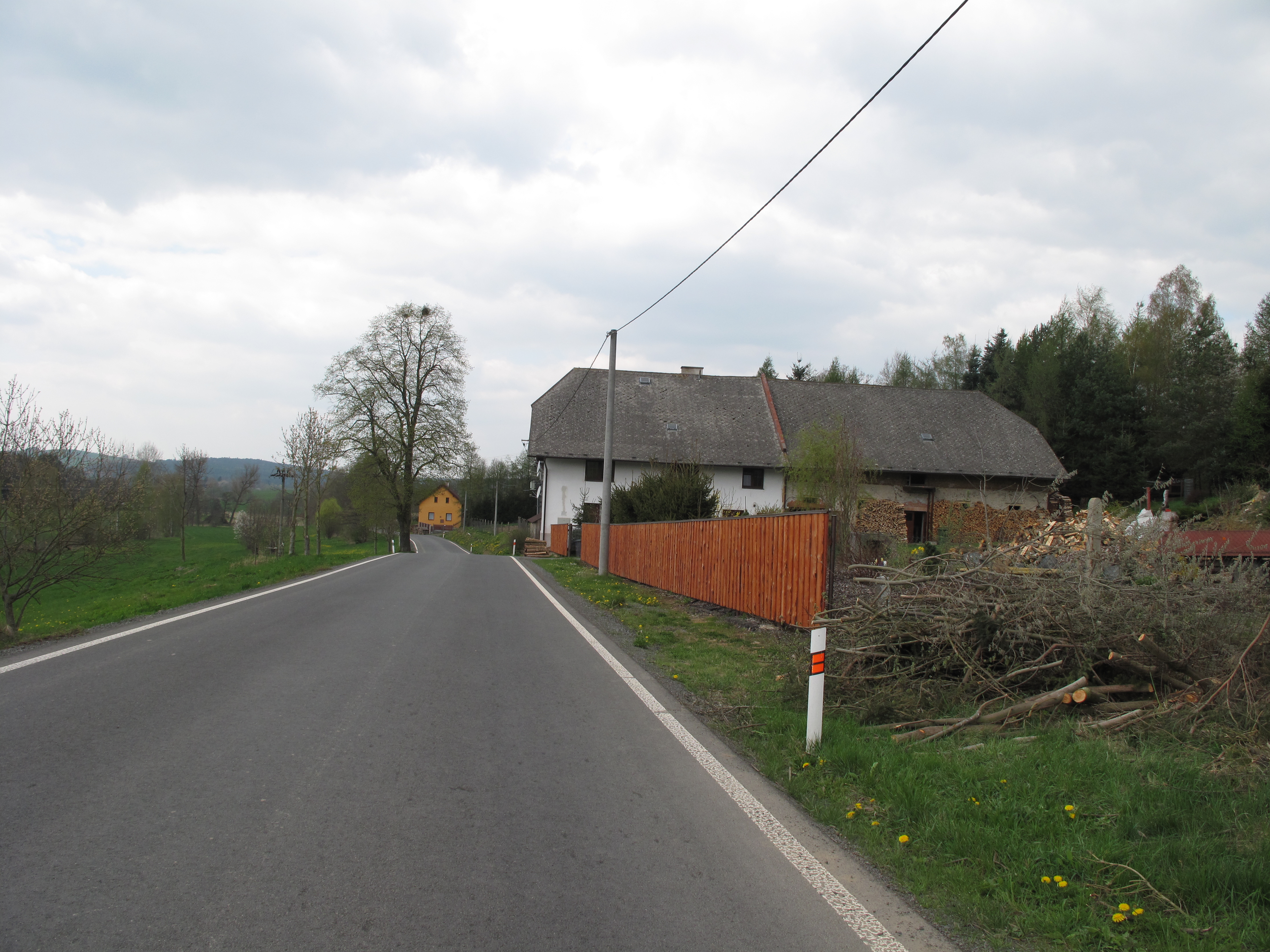 Pláně (Všeruby). Okres Domažlice, Česká republika.